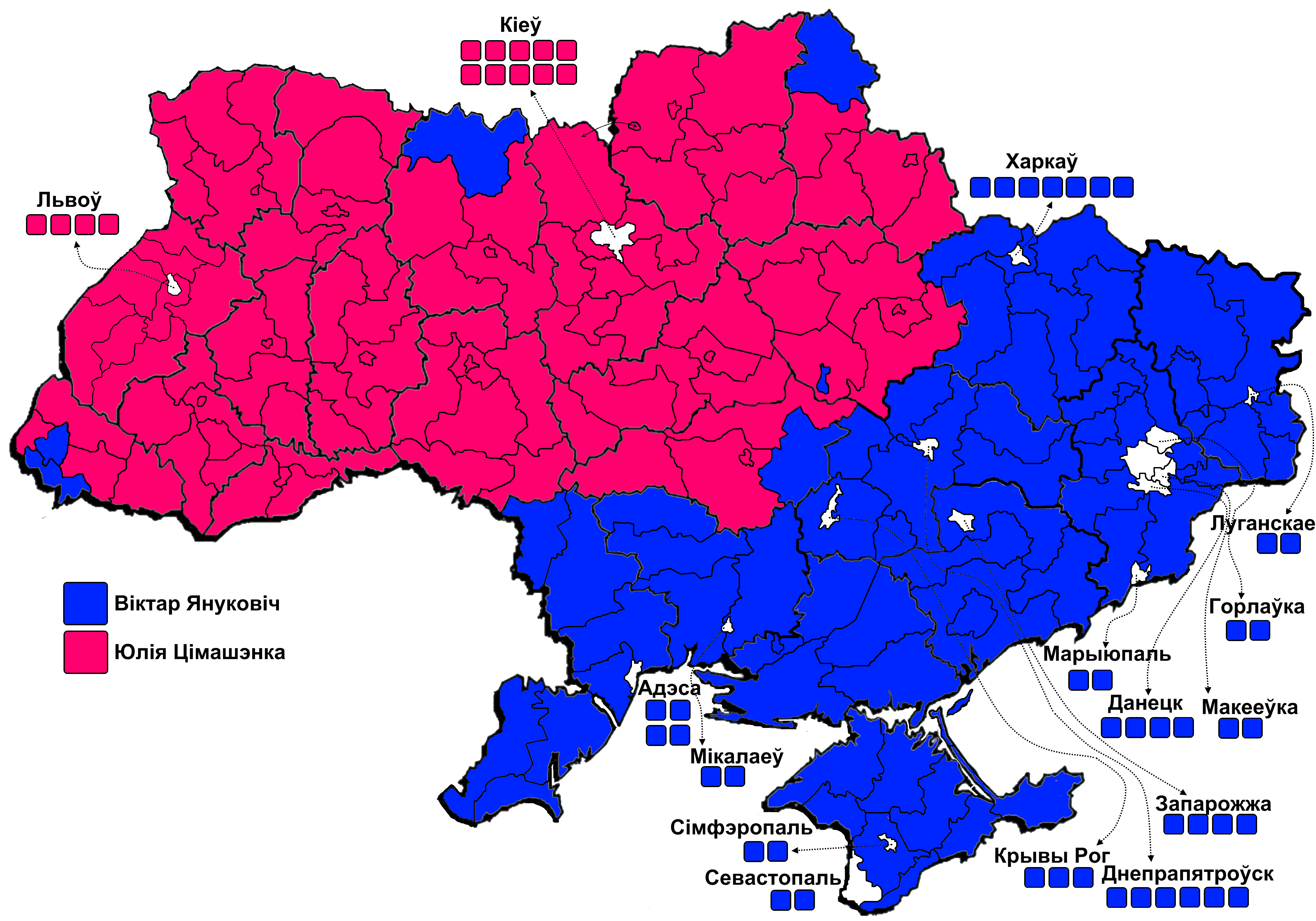 Беларуская (тарашкевіца): Вынікі другога туру выбараў Прэзыдэнта Ўкраіны 2010. (па беларуску)